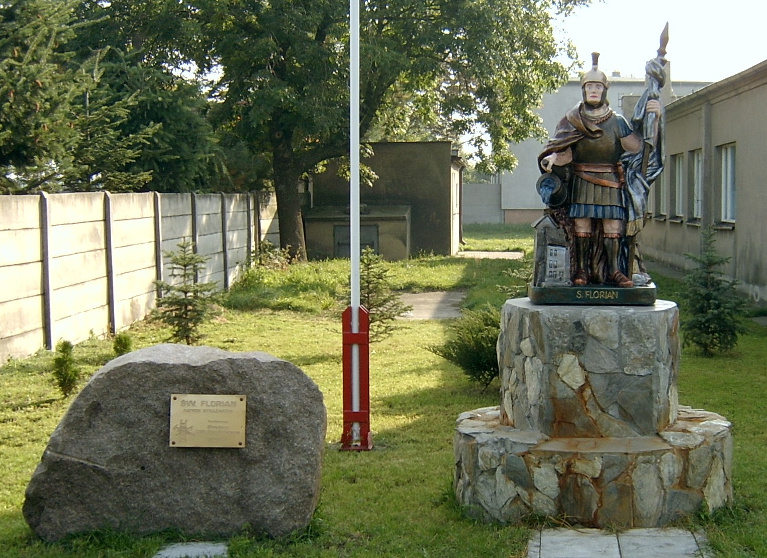 Święty Florian na Ochotnicza Straż Pożarna w Przybyszewie.